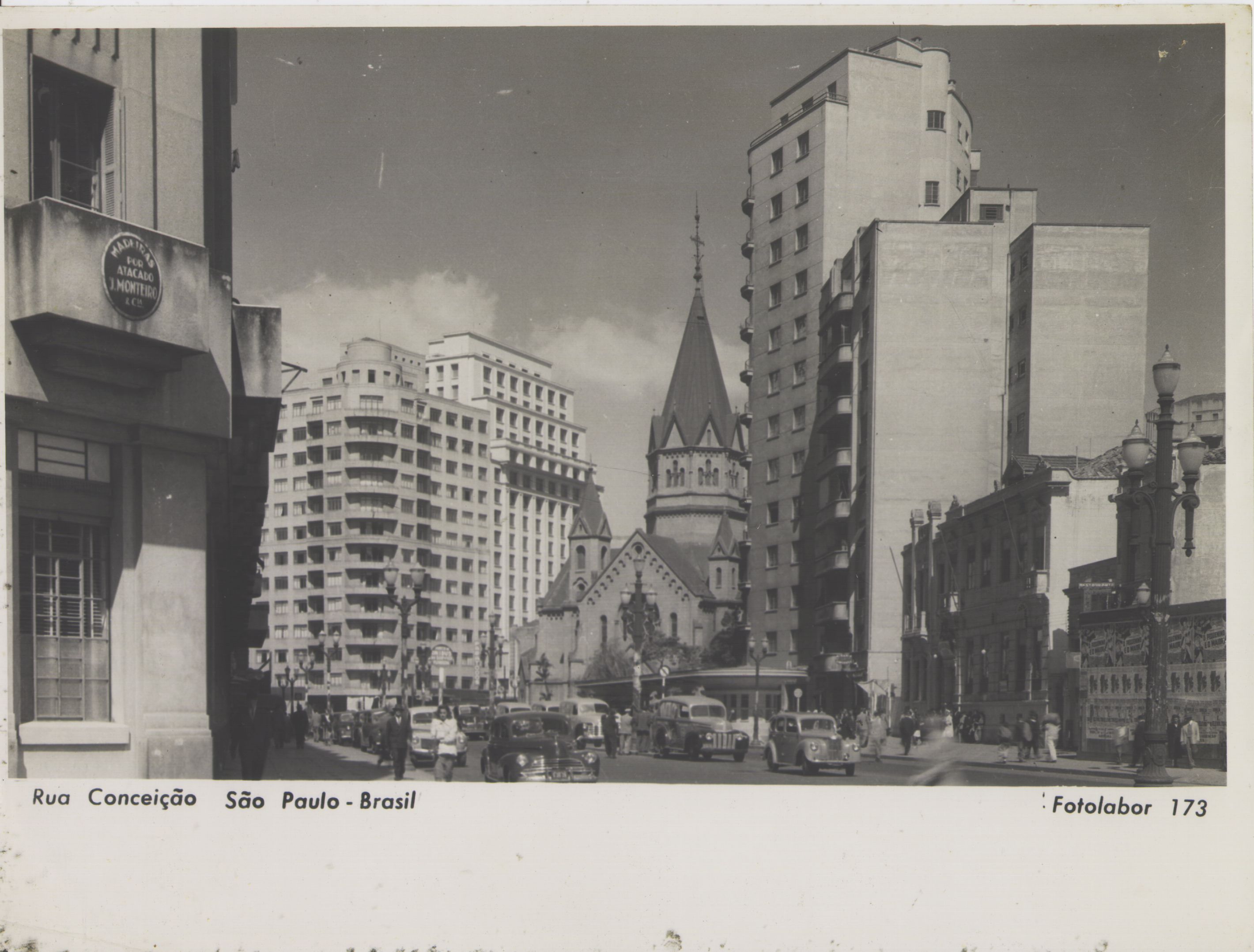 Obra que integra o acervo do Museu Paulista da USP. Coleção Werner Haberkorn